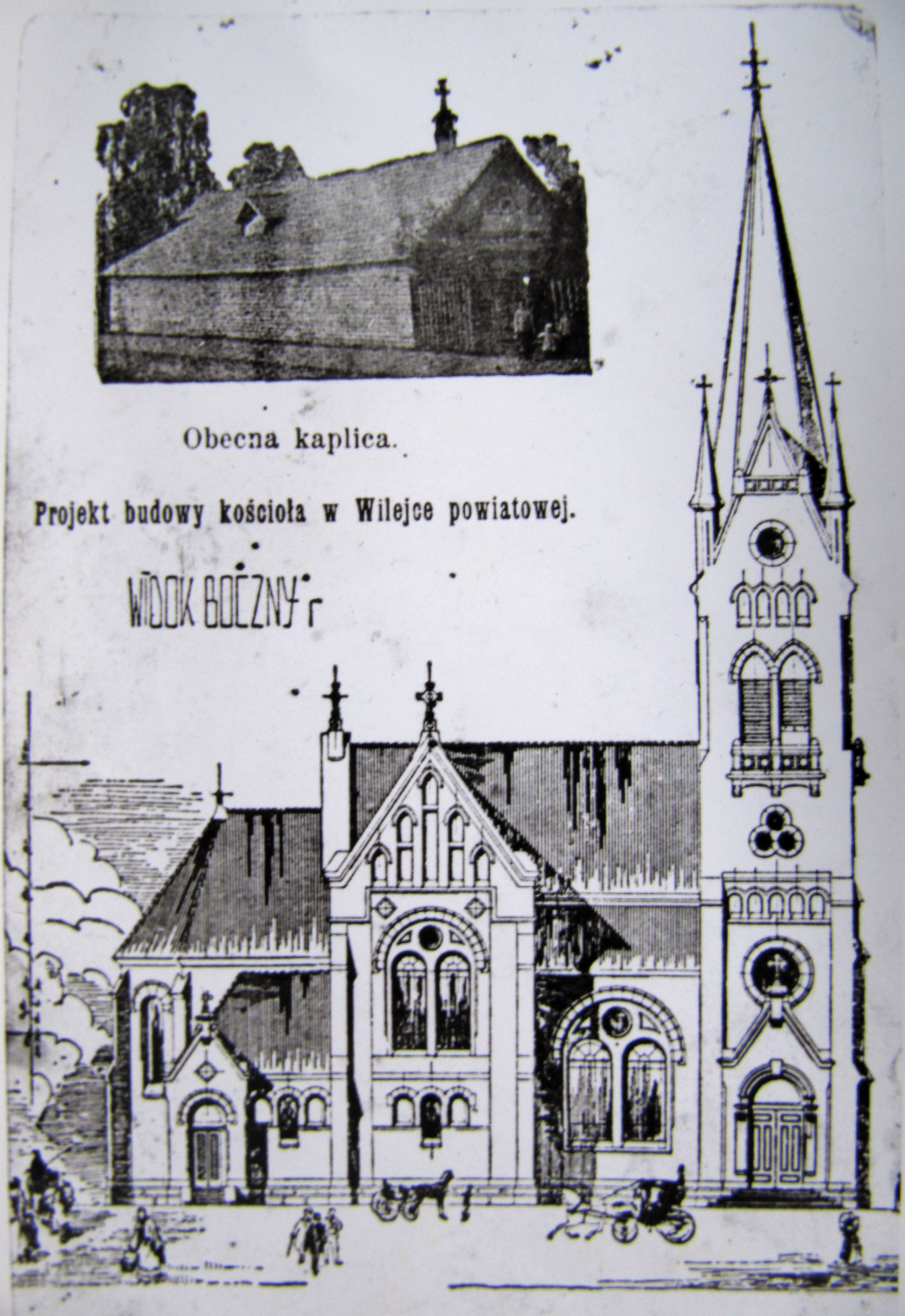 Беларуская (тарашкевіца): Вялейка (Vialejka). Касьцёл Узвышэньня Сьвятога Крыжа